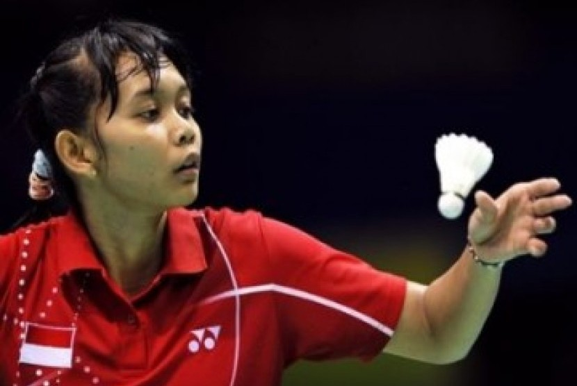 Maria Kristin Yulianti